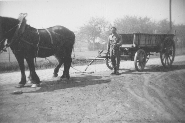 Attelage agricole 1947 photo personelle PAS DE COPYRIGHT!